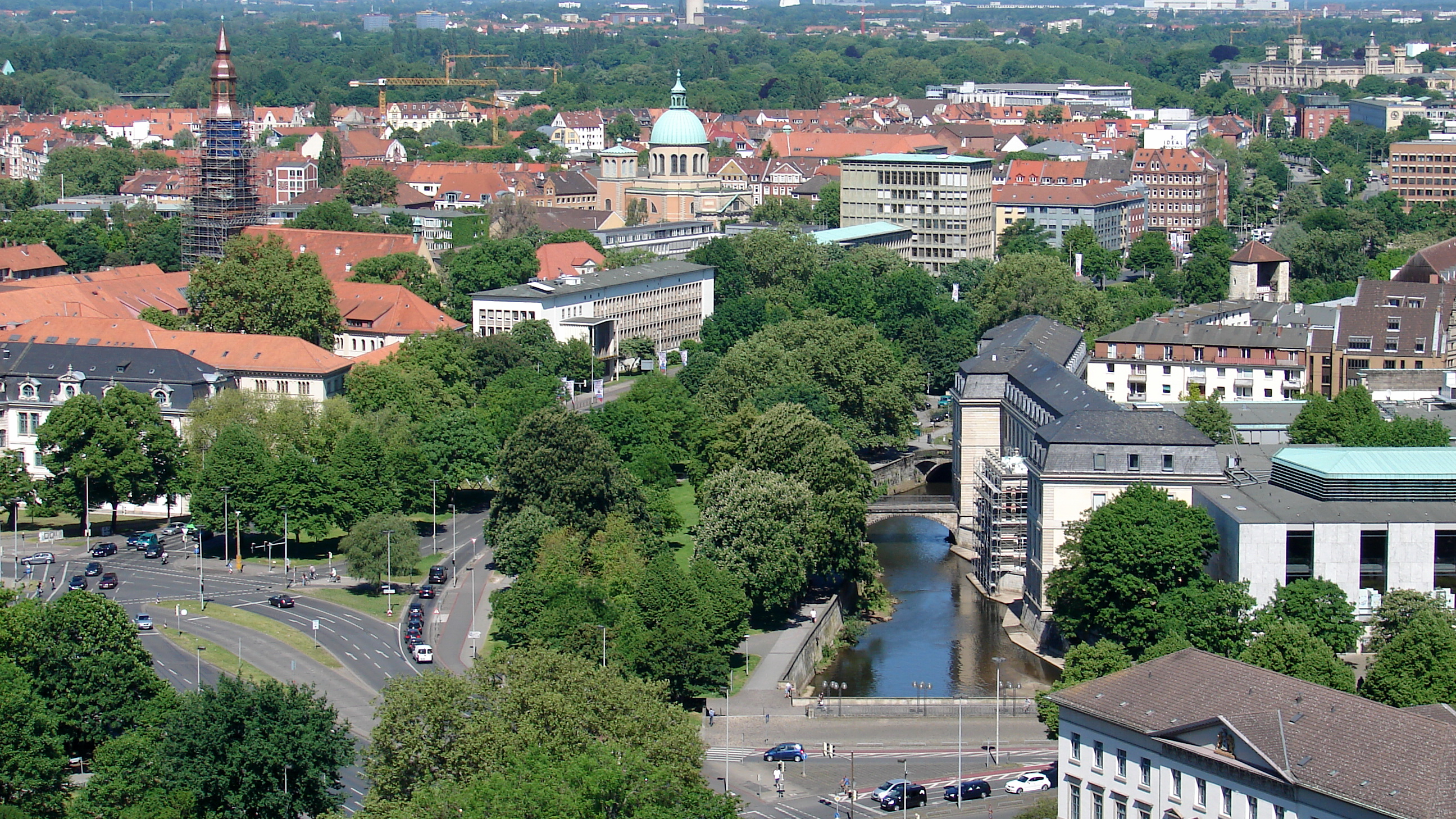 Die eigentliche Calenberger Neustadt befindet sich im Bereich zwischen Leine, Lavesallee, Humboldtstraße und Goethestraße. Die erste Stadterweiterung Hannovers entstand in der zweiten Hälfte des 17. Jahrhunderts und wurde nach dem Calenberger Land benannt.